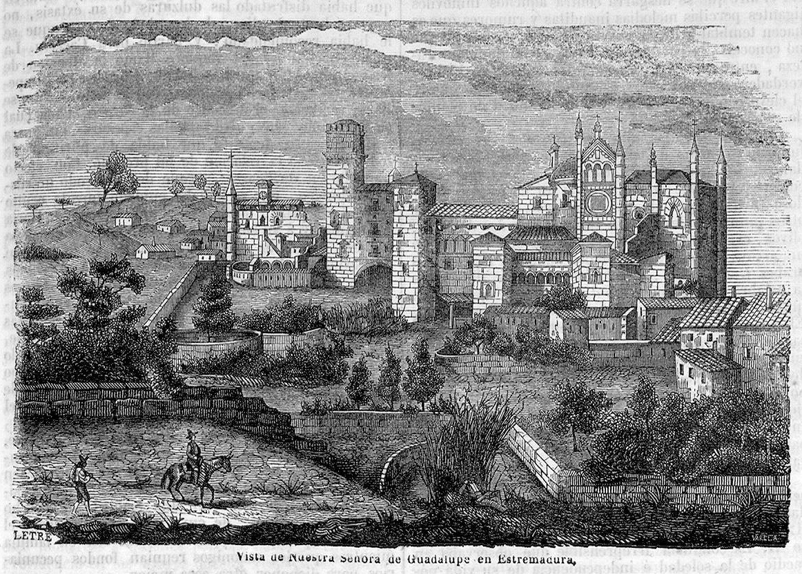 Vista de Nuestra Señora de Guadalupe en Estremadura [sic].